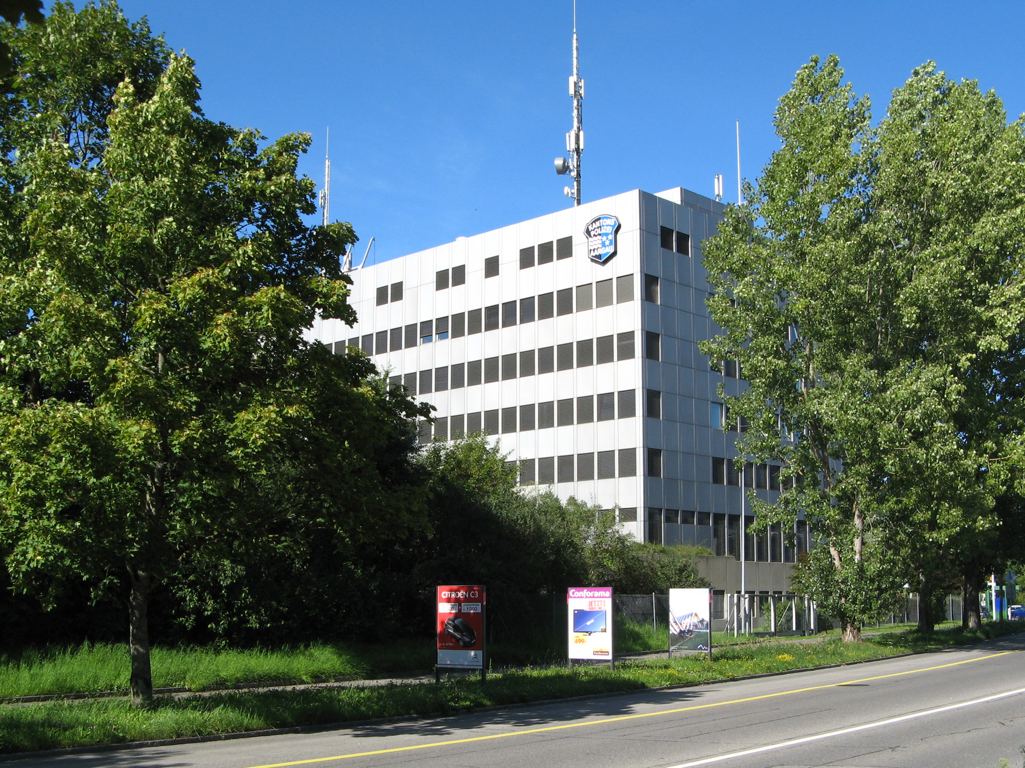 Kommando der Aargauer Kantonspolizei in Aarau